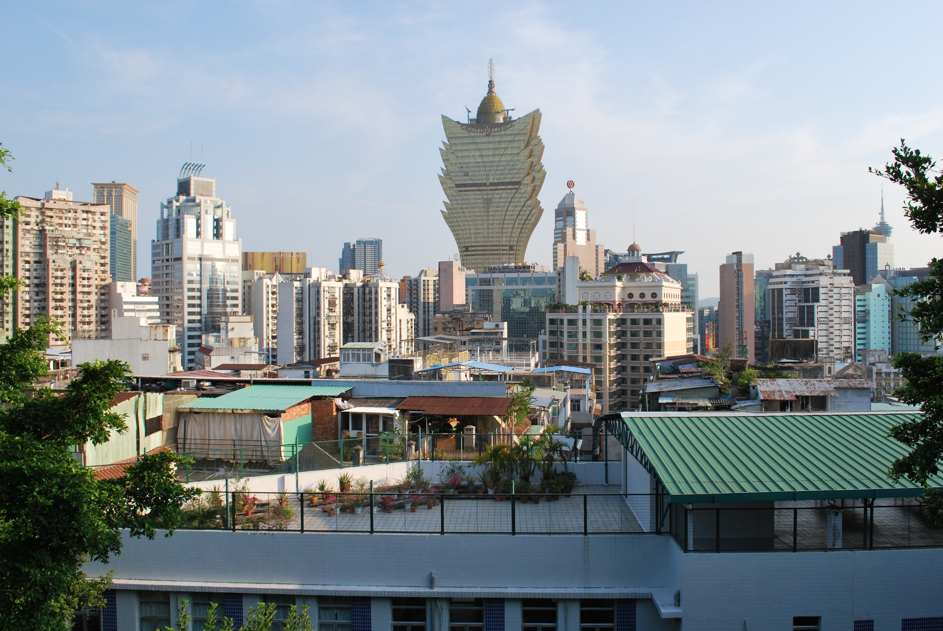 マカオ市内